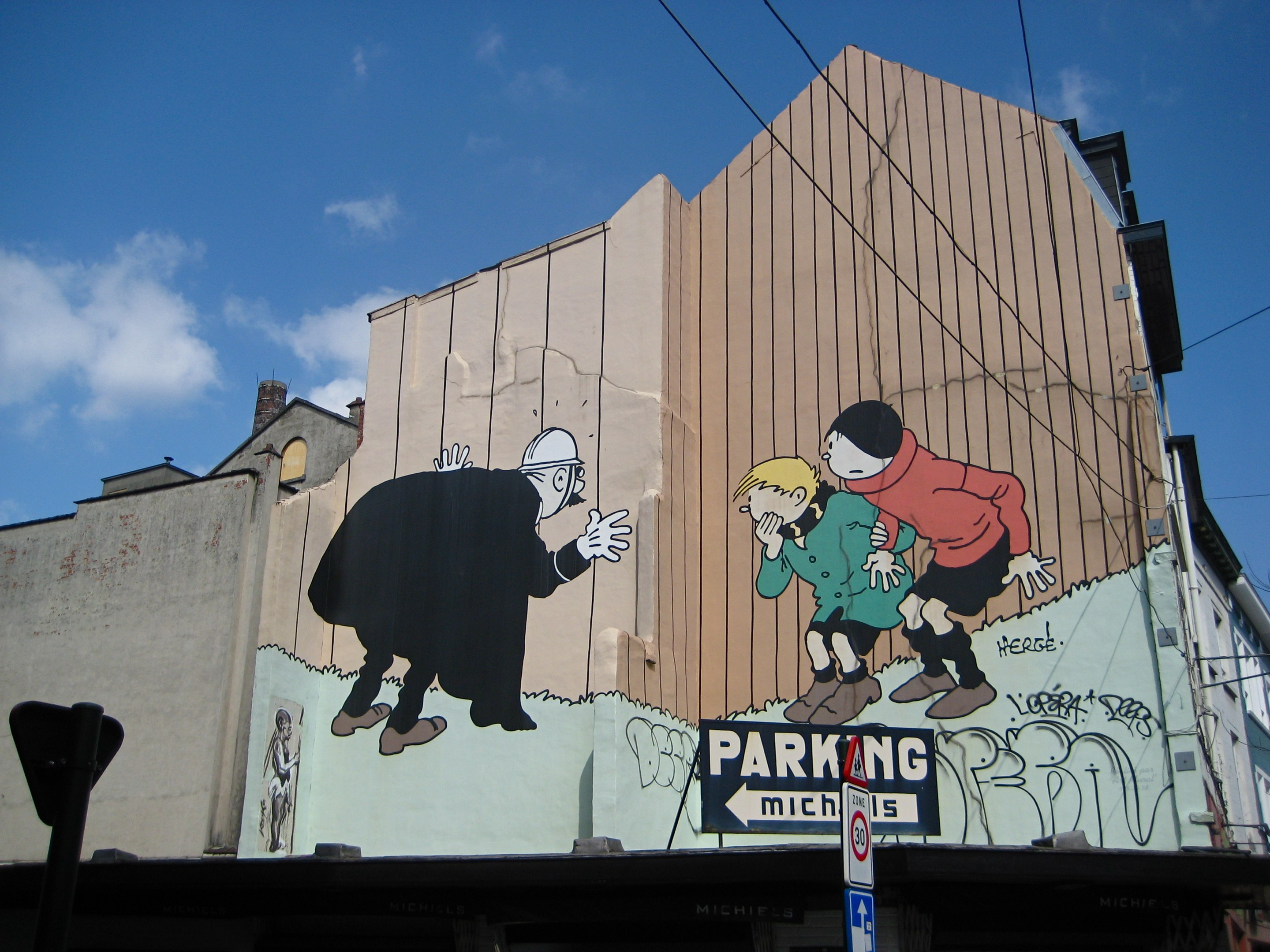 Oude stripmuur Quick en Flupke te Brussel